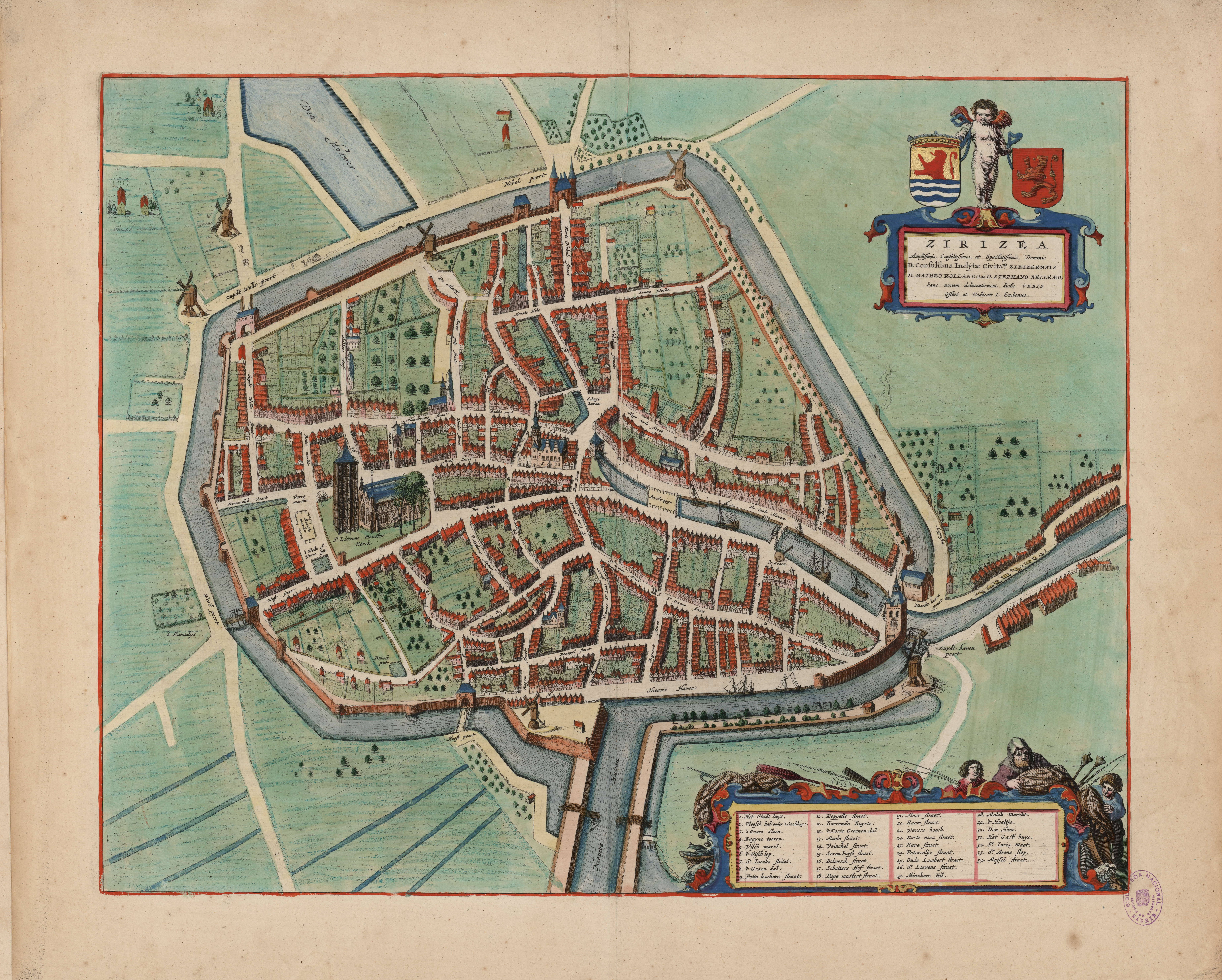 title: ZIRIZEA; size=41,5x52,5 cm